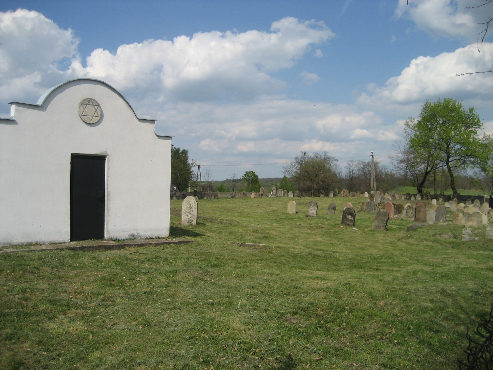 Fragment cmentarza żydowskiego w Żabnie